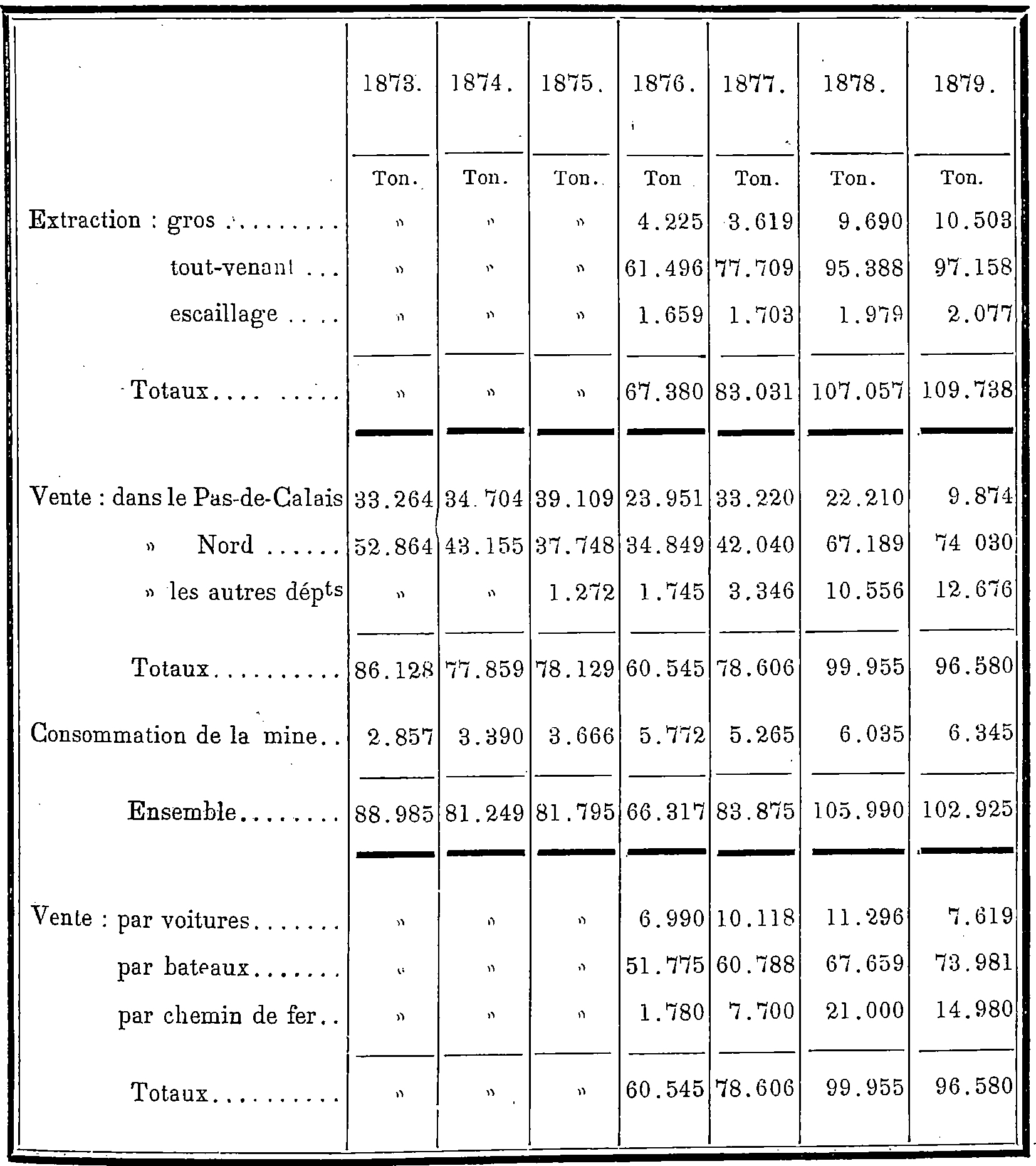 Renseignement sur la vente entre 1873 et 1879 de la Compagnie des mines de Meurchin.